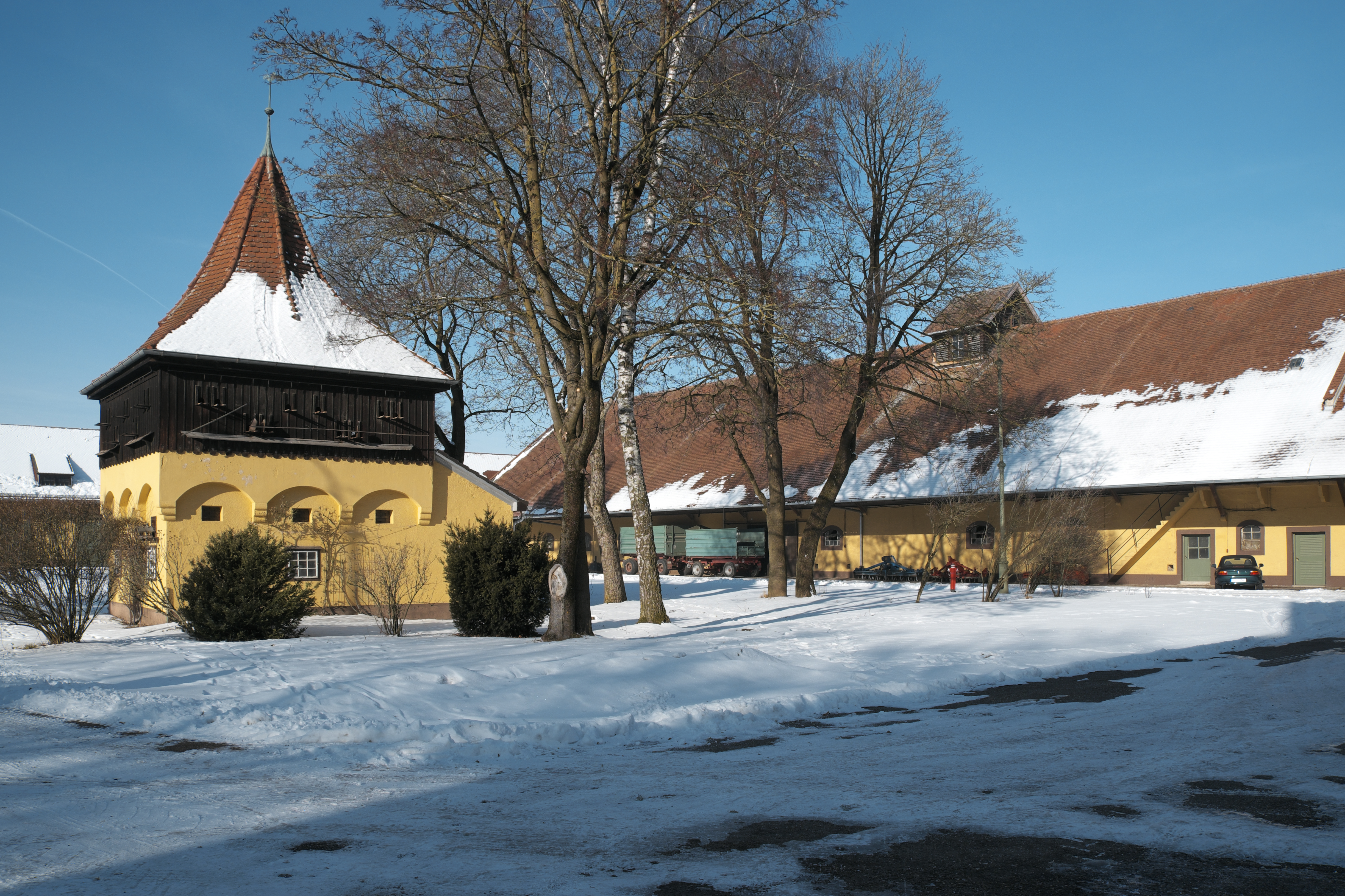 Gutshof der ehemaligen Kreis-Heil- und Pflegeanstalt, heute Isar-Amper-Klinikum München-Ost, in Haar im Landkreis München (Bayern/Deutschland)